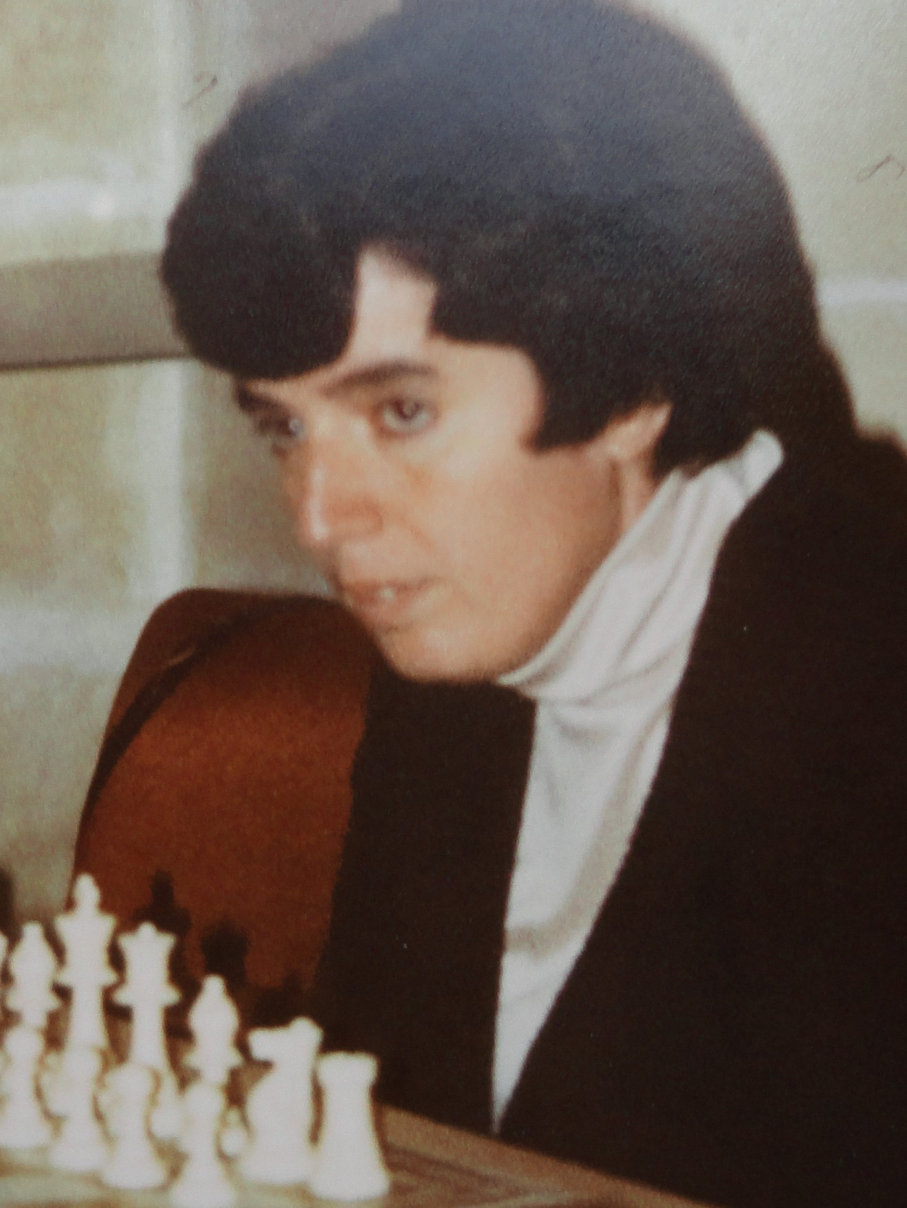 Nona Gaprindashvili